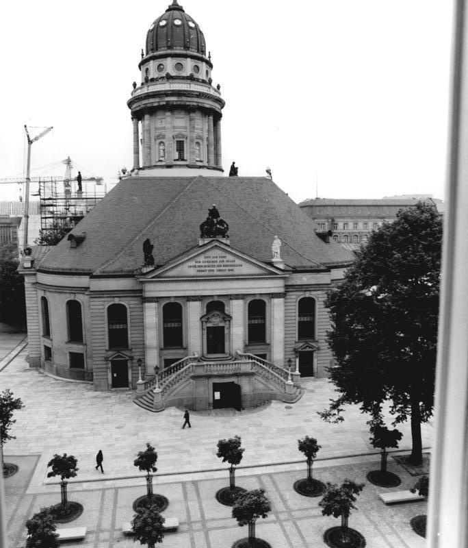 ADN-ZB Deutsche Demokratische Republik 18.9.1985 Die Hugenotten und das Edikt von Potsdam (Serie-5 Motive) Die 1705 vollendete und im Mai 1944 durch den II. Weltkrieg zerstörte Französische Friedrichstadtkirche am Platz der Akademie in Berlin ist wieder Zentrum für die Mitglieder der Hugenotten-Gemeinde in der DDR sowie Anziehungspunkt für viele Berliner und ihre Gäste. Das Untergeschoß beherbergt u. a. die Kirche und die 12.000 Titel unfassende kostbare Bibliothek, die 1770 gegründet wurde. In einer Ausstellung über die Gechichte der Hugenotten wird u. a. belegt, daß um 1770 jeder sechste Berliner ein geflüchteter Franzose, ein Refugiè, war.-siehe auch 303,304,306 und 307N Reporter: Junge Copyright: ADN-Zentralbild-Berlin-DDR